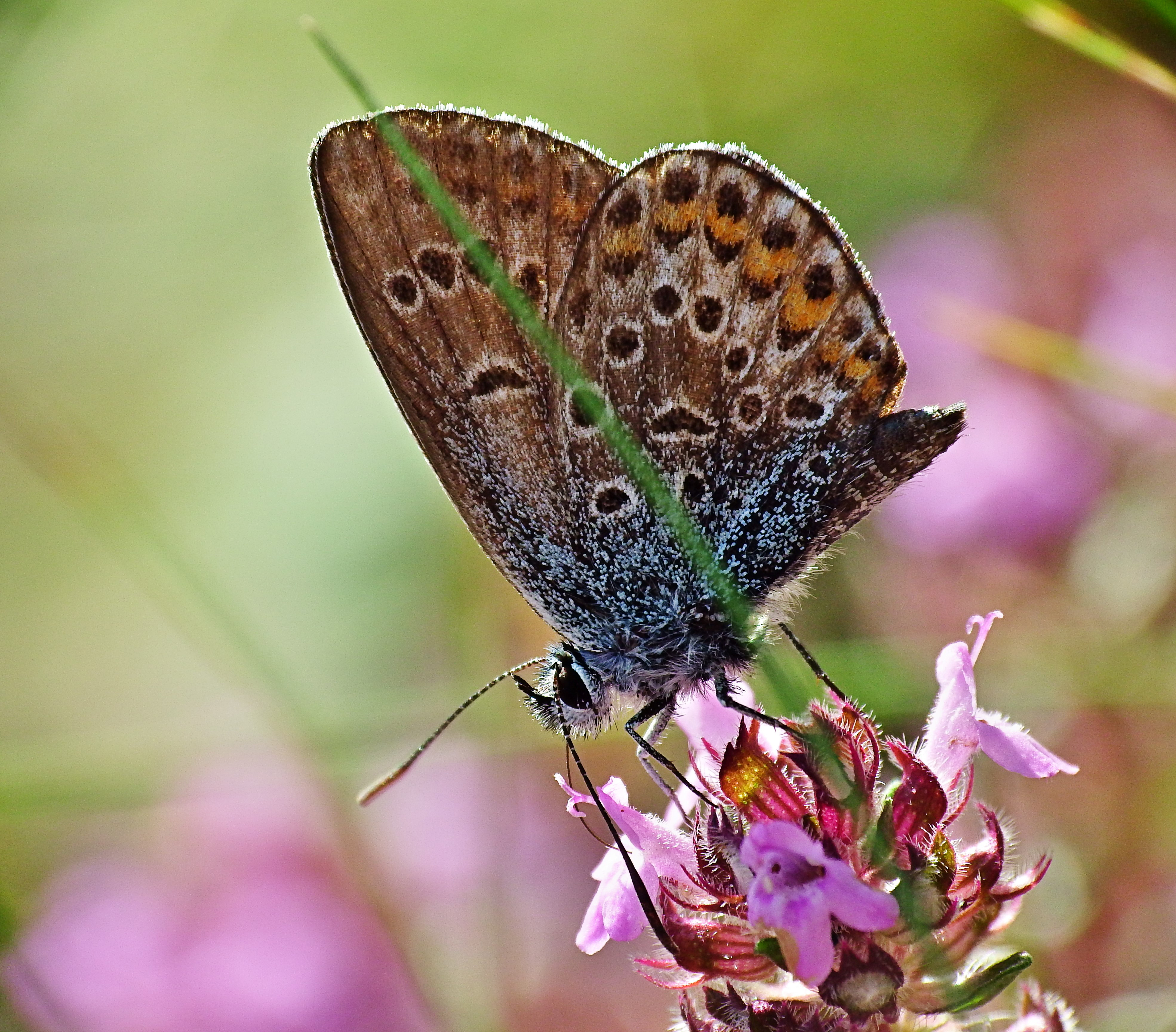 Bläuling (Lycaenidae; nicht näher bestimmt) auf Sand-Thymianblüte am Wegesrand im Naturschutzgebiet Lüneburger Heide (LÜ 002), Landkreis Heidekreis, Niedersachsen.